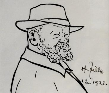 Heinrich Zille: Selbstporträt, 1922